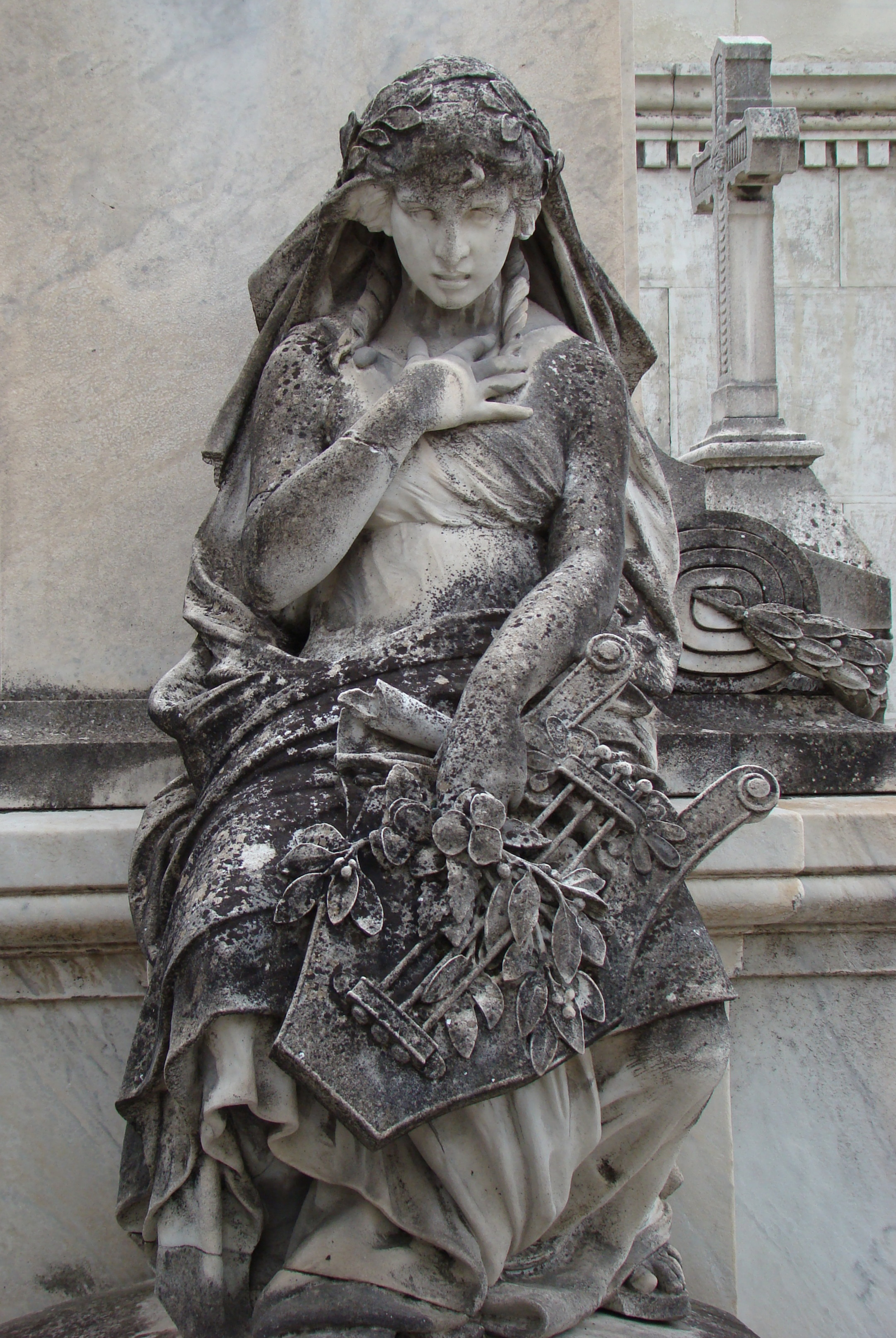 1909, escultura de Cipriano Folgueras El mausoleo se inauguró en 1909, costeado por los herederos de Campoamor, que había fallecido en 1901 Reposan también los restos de la esposa de Campoamor, Guillermina O'Gorman, fallecida en 1890 DSC00408